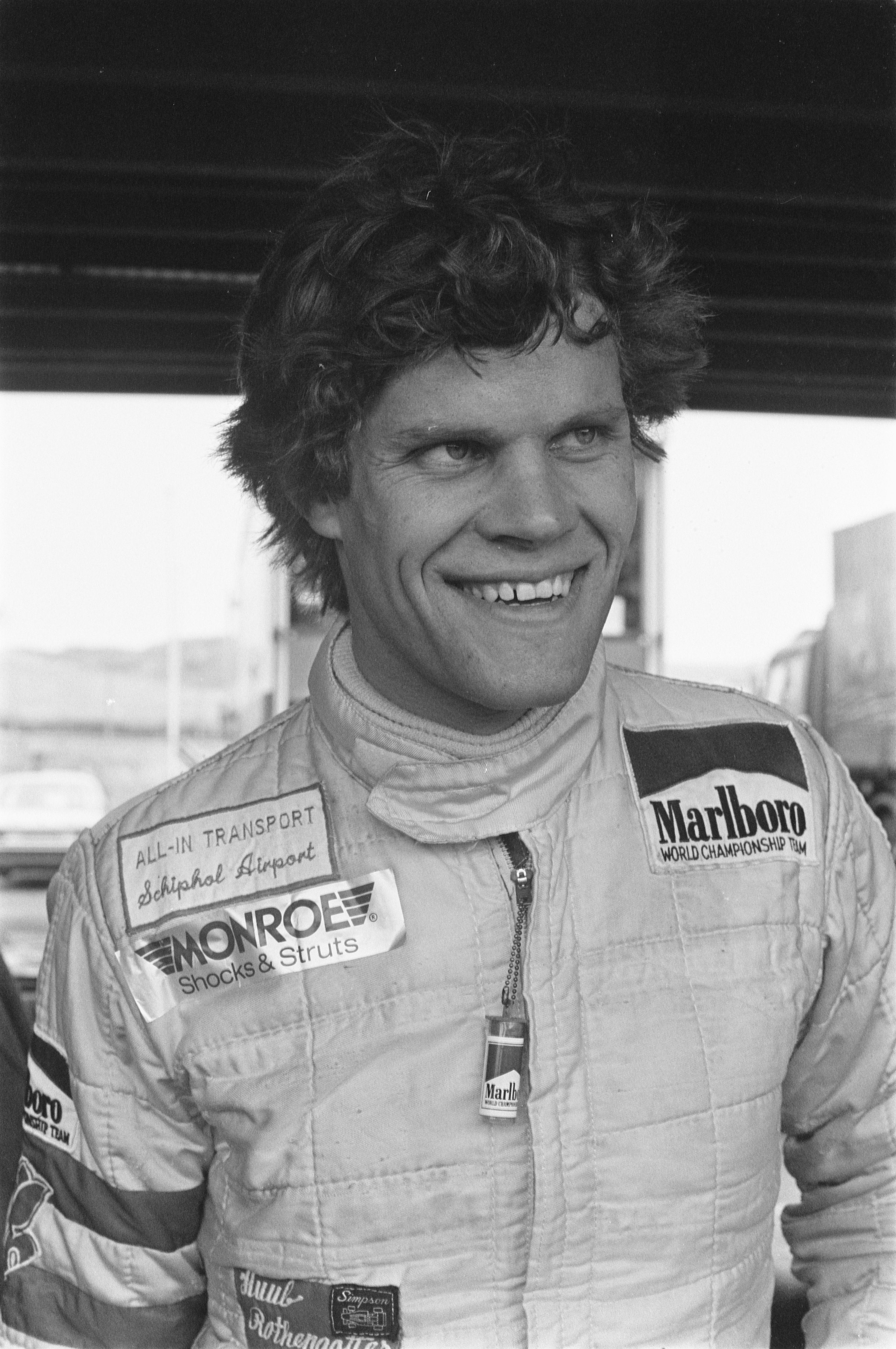 Huub Rothengatter sur le circuit de Zandvoort en 1984.